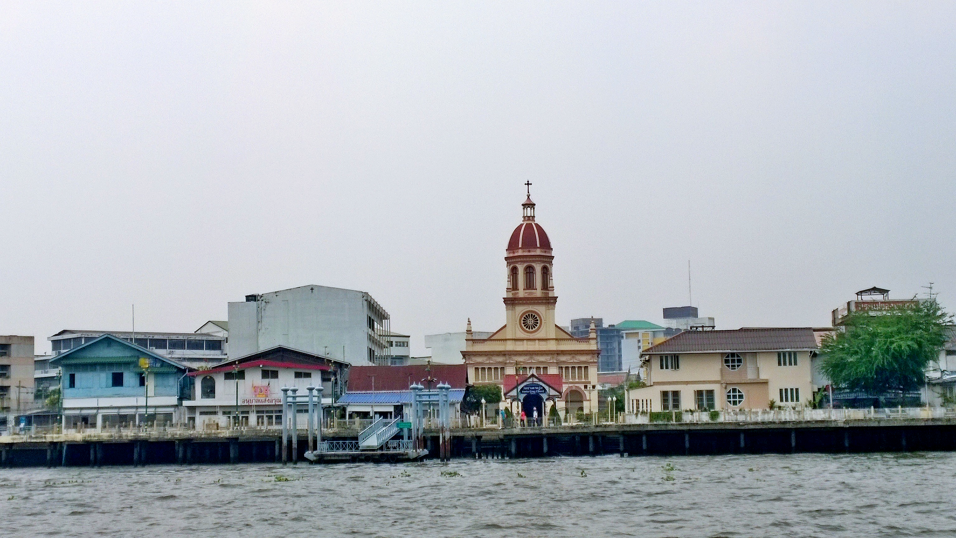 Wang Burapha Phirom, Phra Nakhon, Bangkok, Thailand